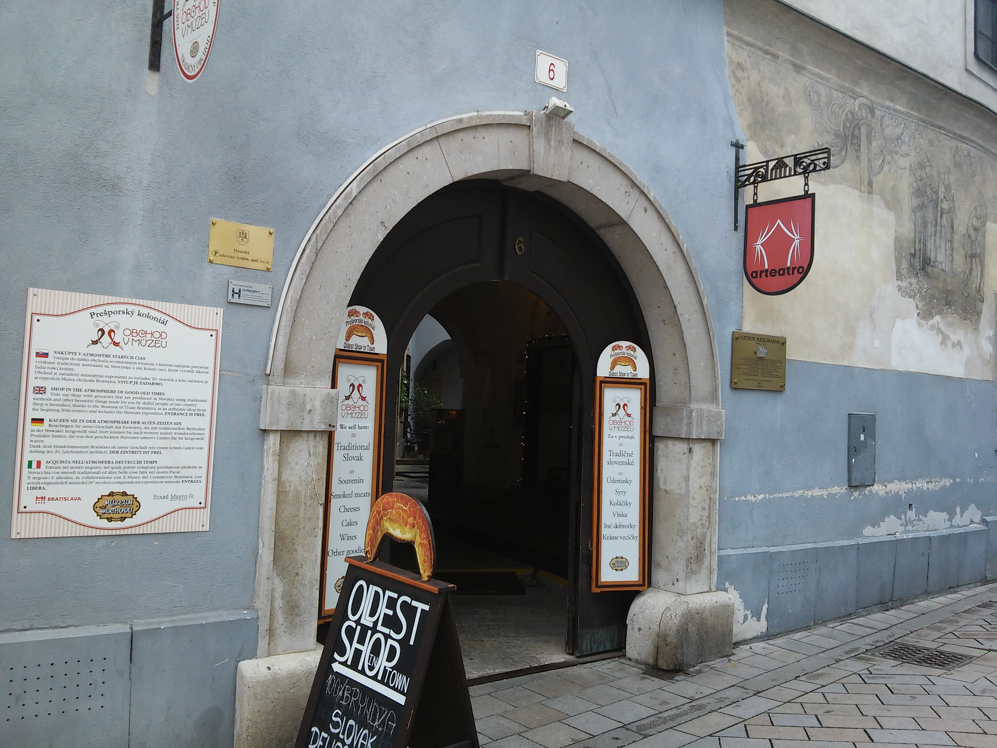 Divadlo Arteatro, Biela ulica, Staré Mesto, Bratislava